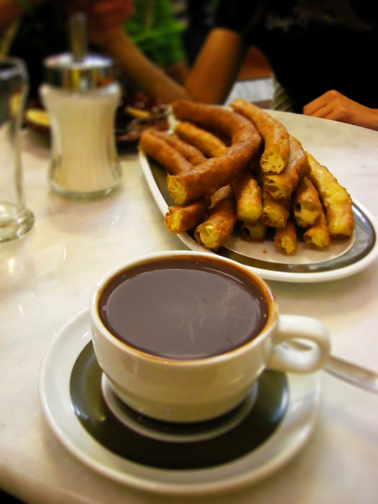 Chocolate valor con churros.